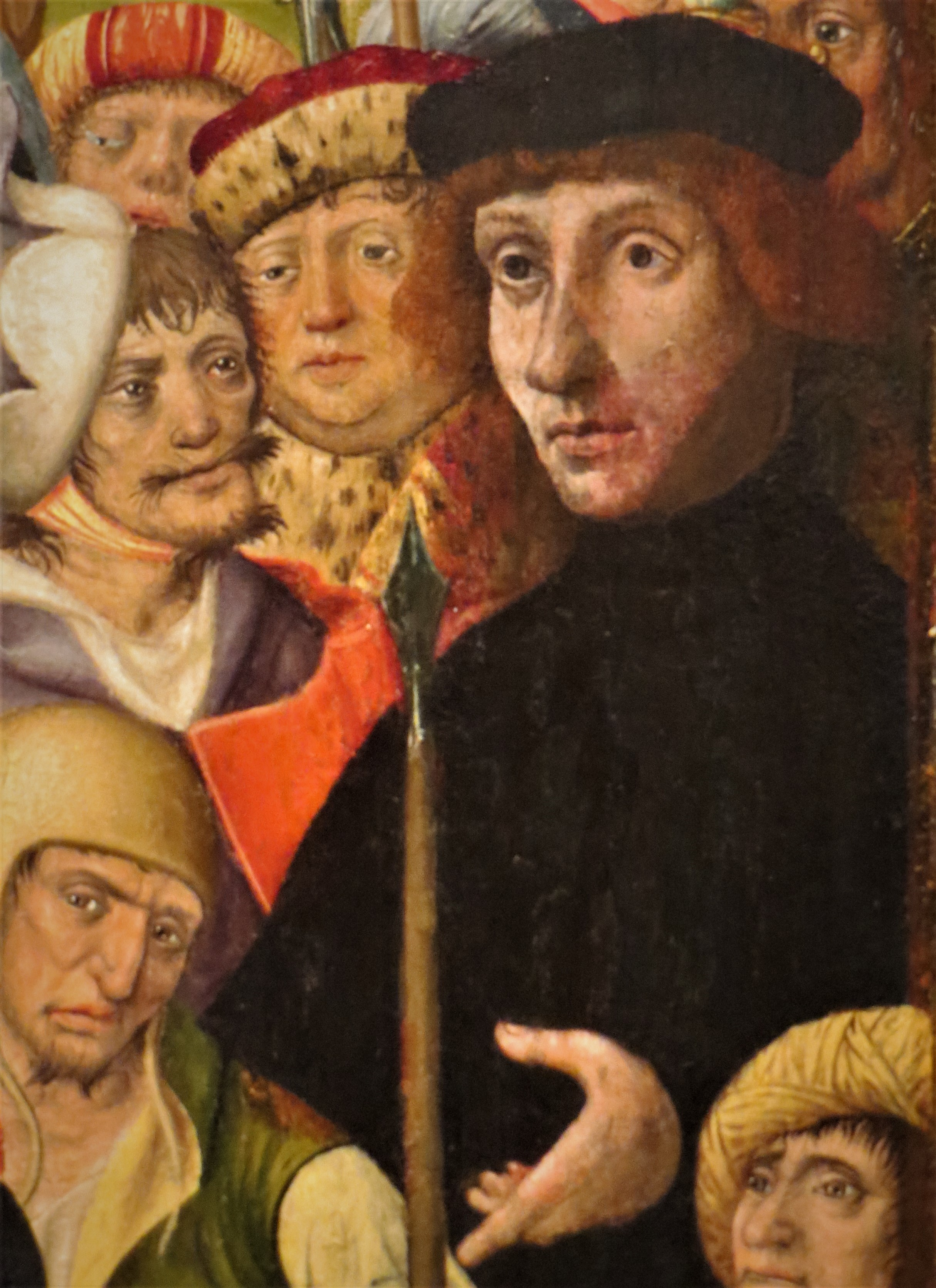 Kreuzigungsretabel aus St. Jakobi zu Lübeck, dem Meister des Schinkelatars (um 1520) oder Jacob van Utrecht (um 1525) zugeschrieben, Corpus Bd. 2, Nr. 98, Detail: Selbstbildnis Jacob Utrecht (?)